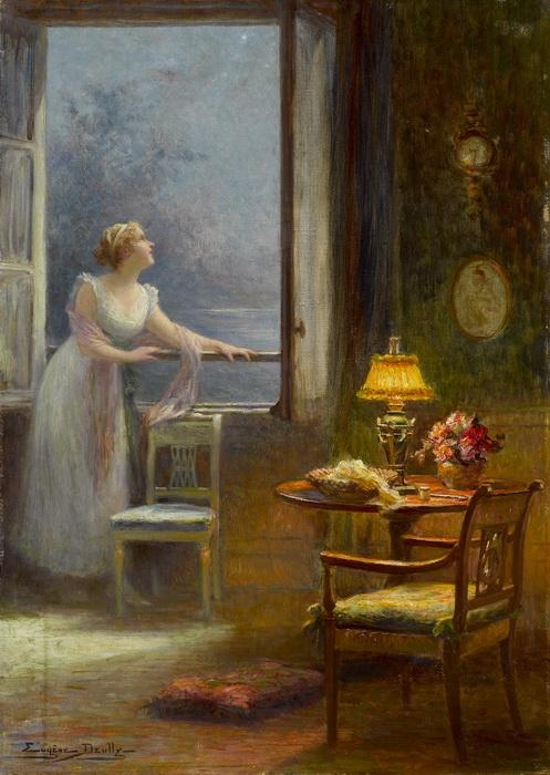 Rêve aux étoiles